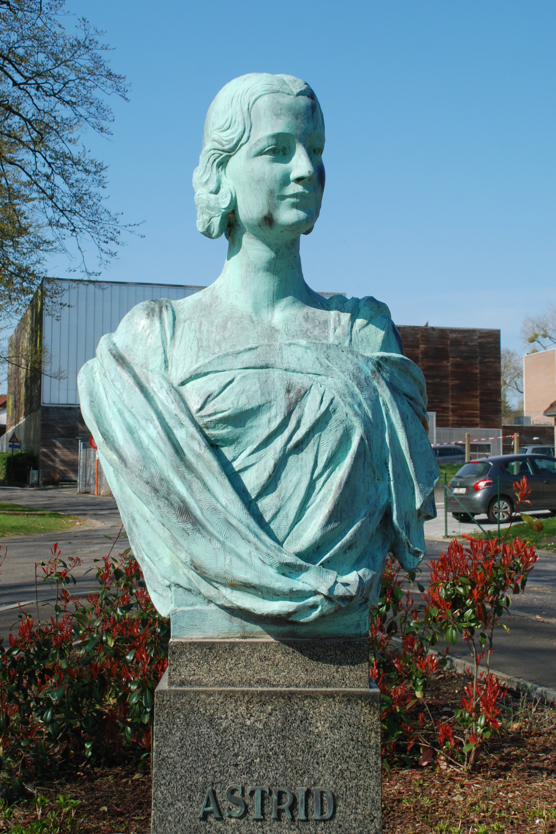 Belgique - Brabant wallon - Court-Saint-Étienne - Parc de Wisterzée - Statue de la Reine Astrid (sculpteur Victor Rousseau 1938 ; réplique 2017)